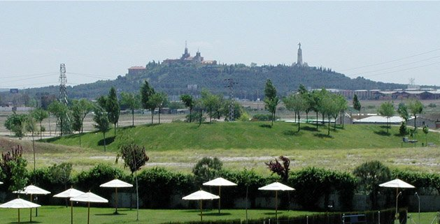 Cerro de los Ángeles (Getafe, España).